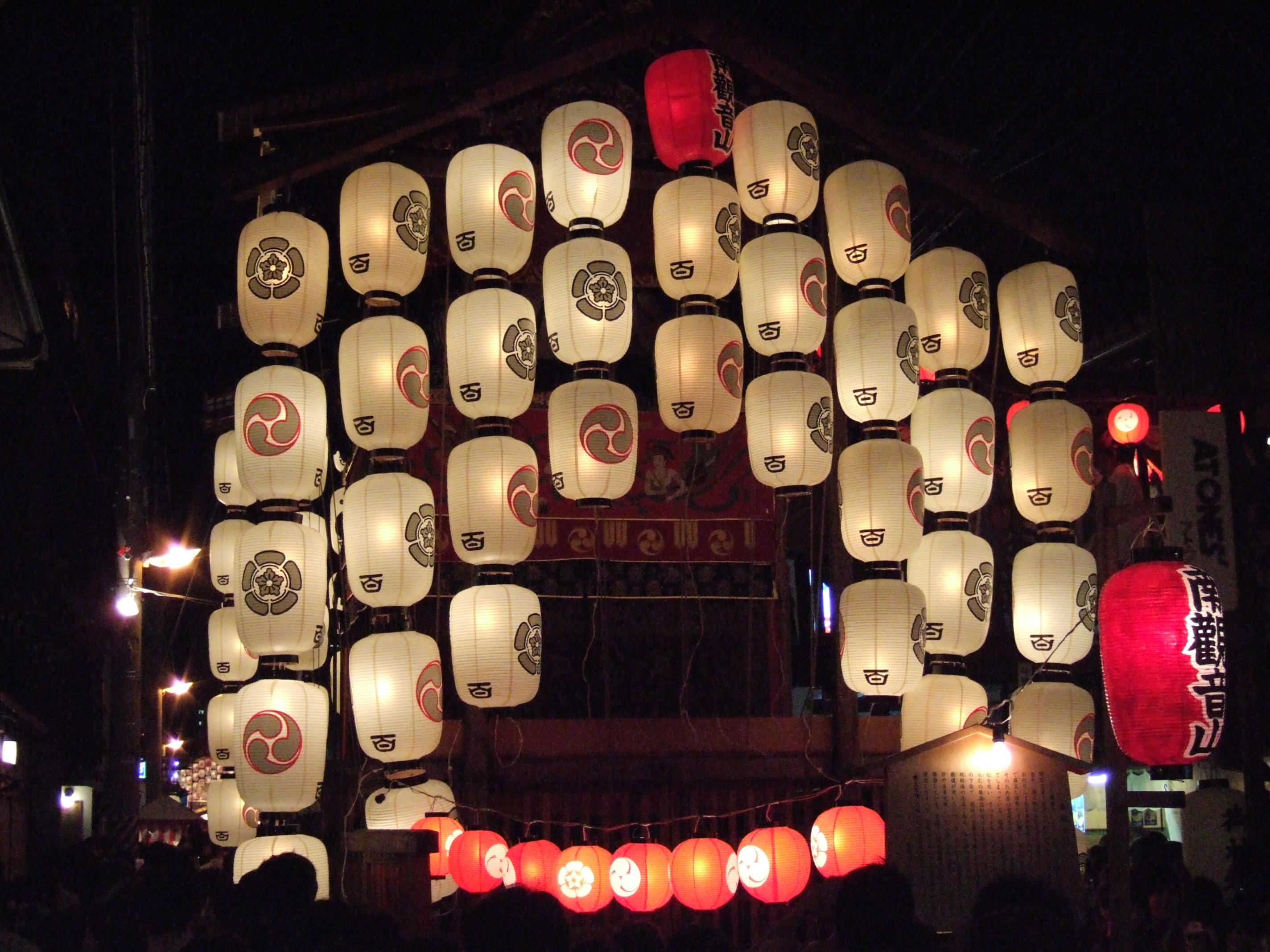 宵山の南観音山 (Minami Kannonyama at Yoiyama, Gion Matsuri)